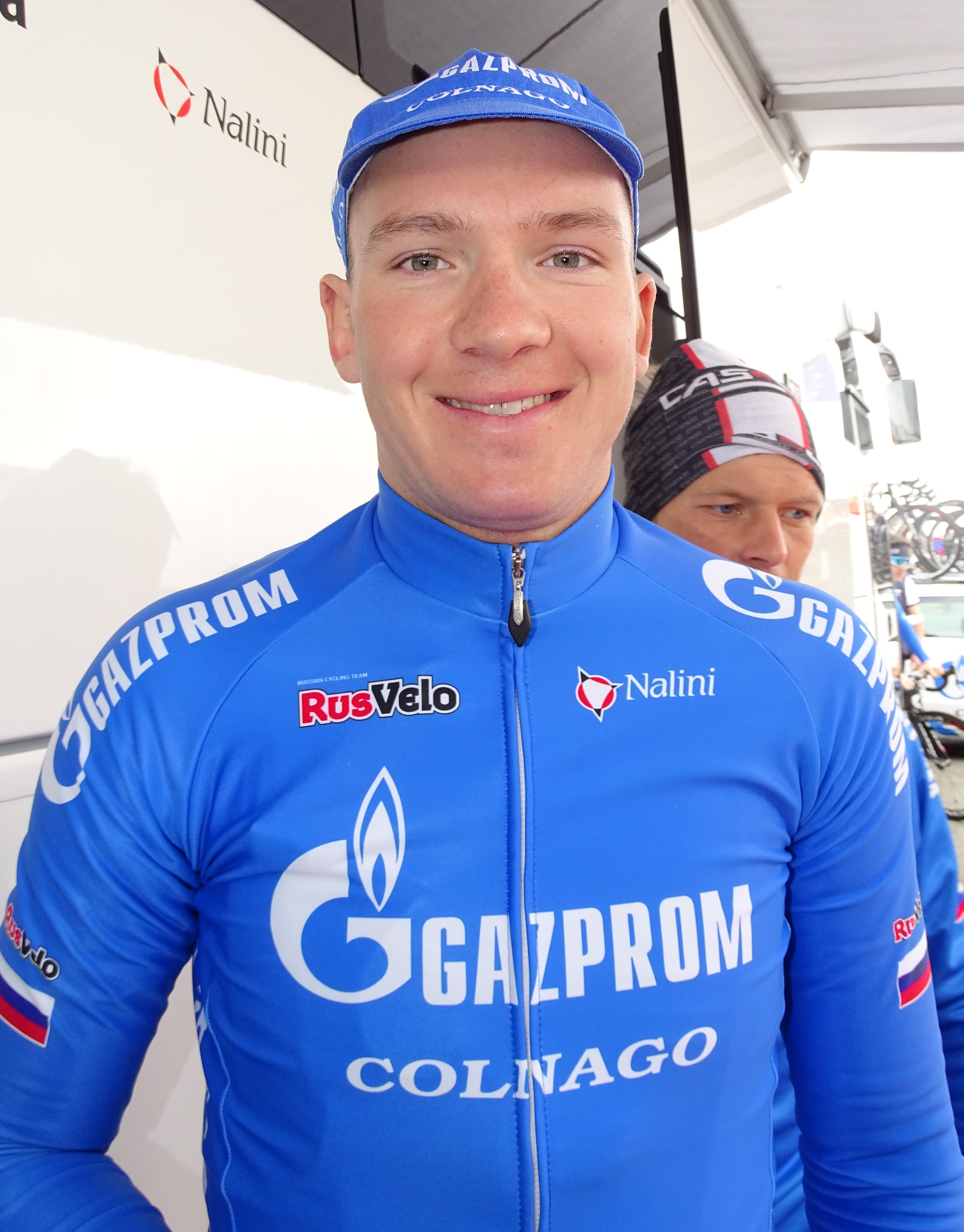 Reportage réalisé le vendredi 18 mars à l'occasion du départ de la Handzame Classic 2016 à Bredene, Belgique.